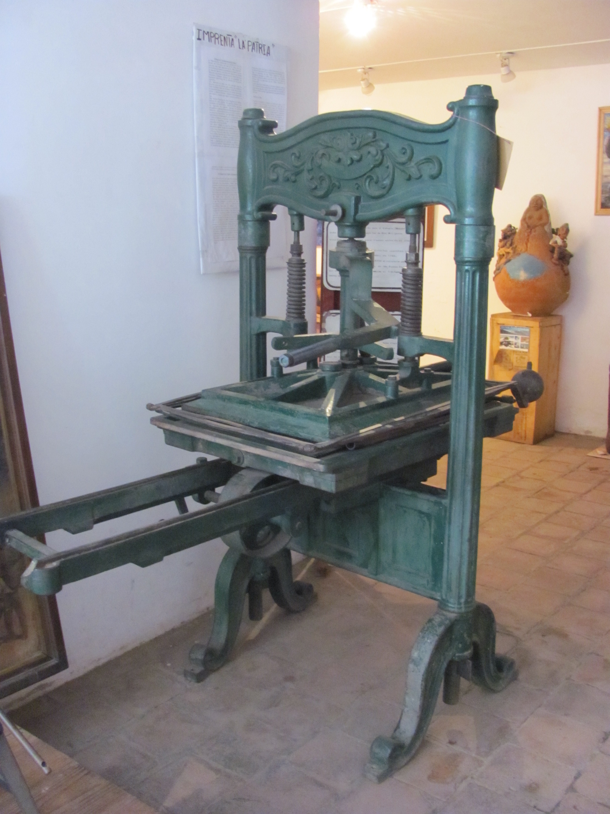 Imprenta de la Patria. Vista general; en Museo del Vino, Cafayate, Salta, Argentina.